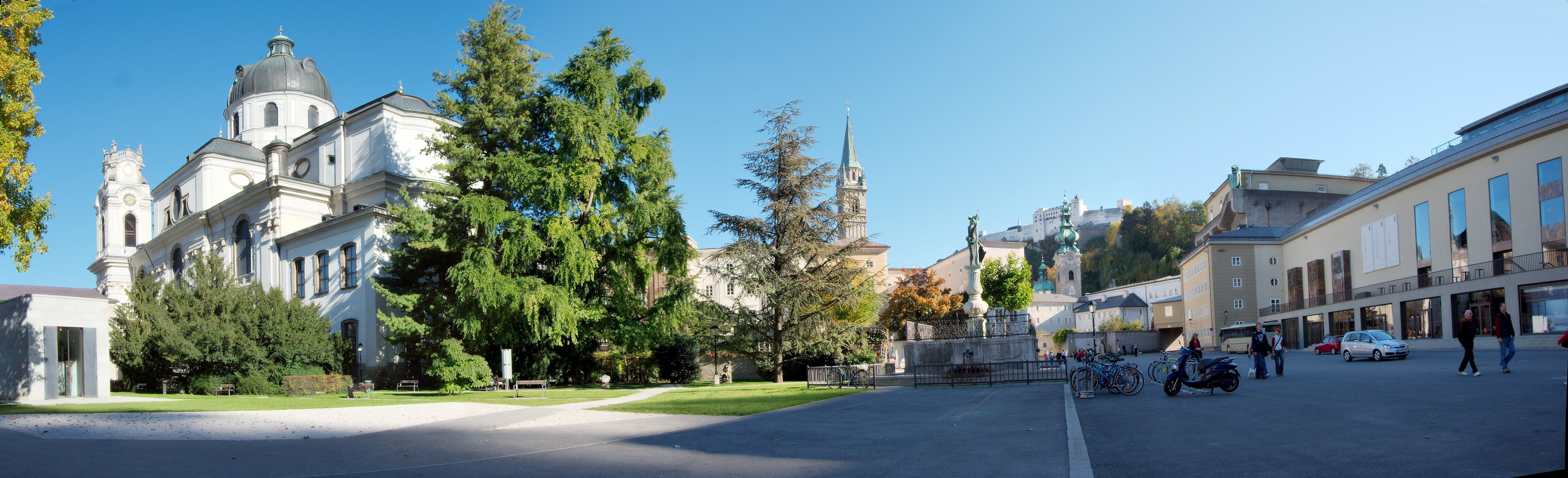 Salzburg, Links Kollegienkirche, Mitte Turm der Franziskanerkirche und Festung und rechts das Haus für Mozart